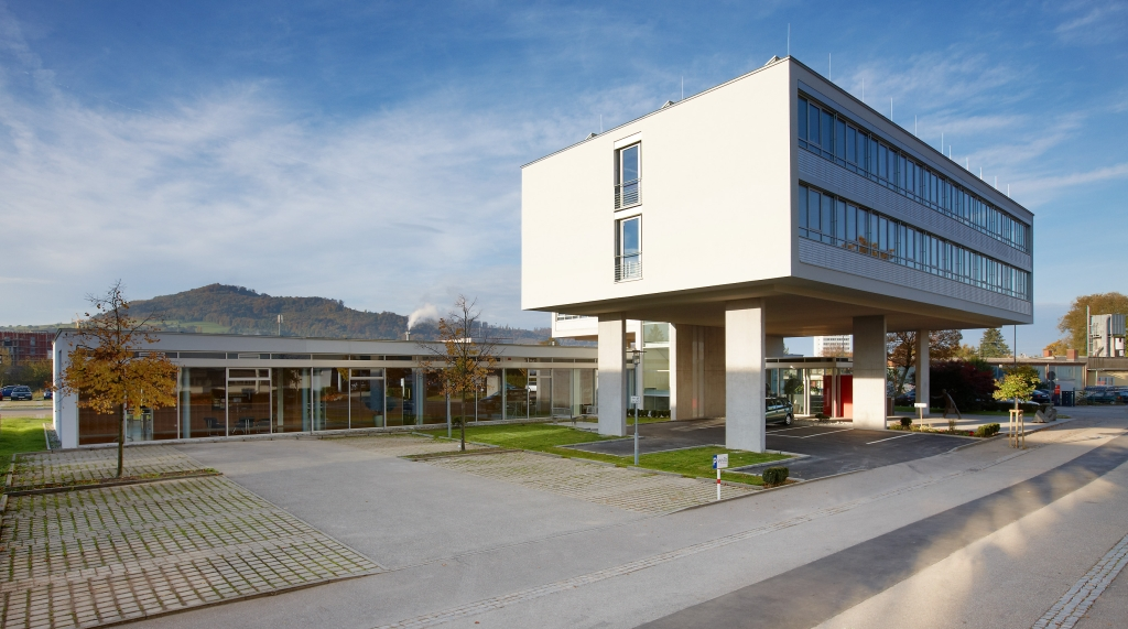 Logo des wvib, Wirtschaftsverband Industrieller Unternehmen Baden